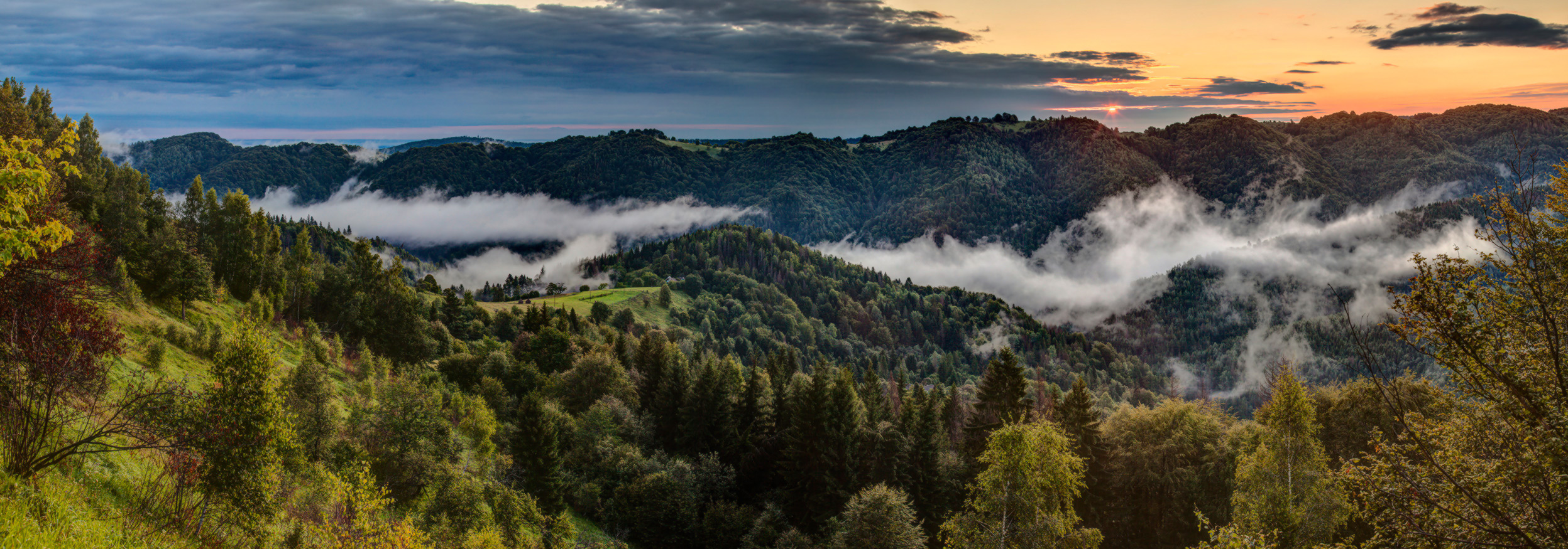 Вижницький, Вижницький район